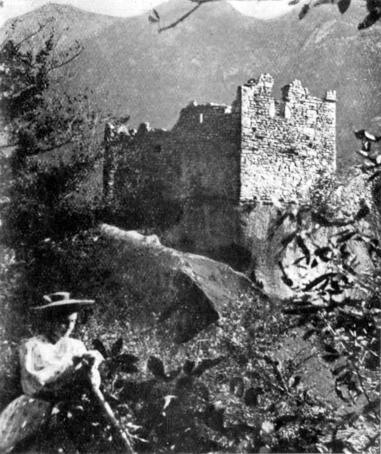 Castello di Rencio, Crodo, angolo nord ovest.